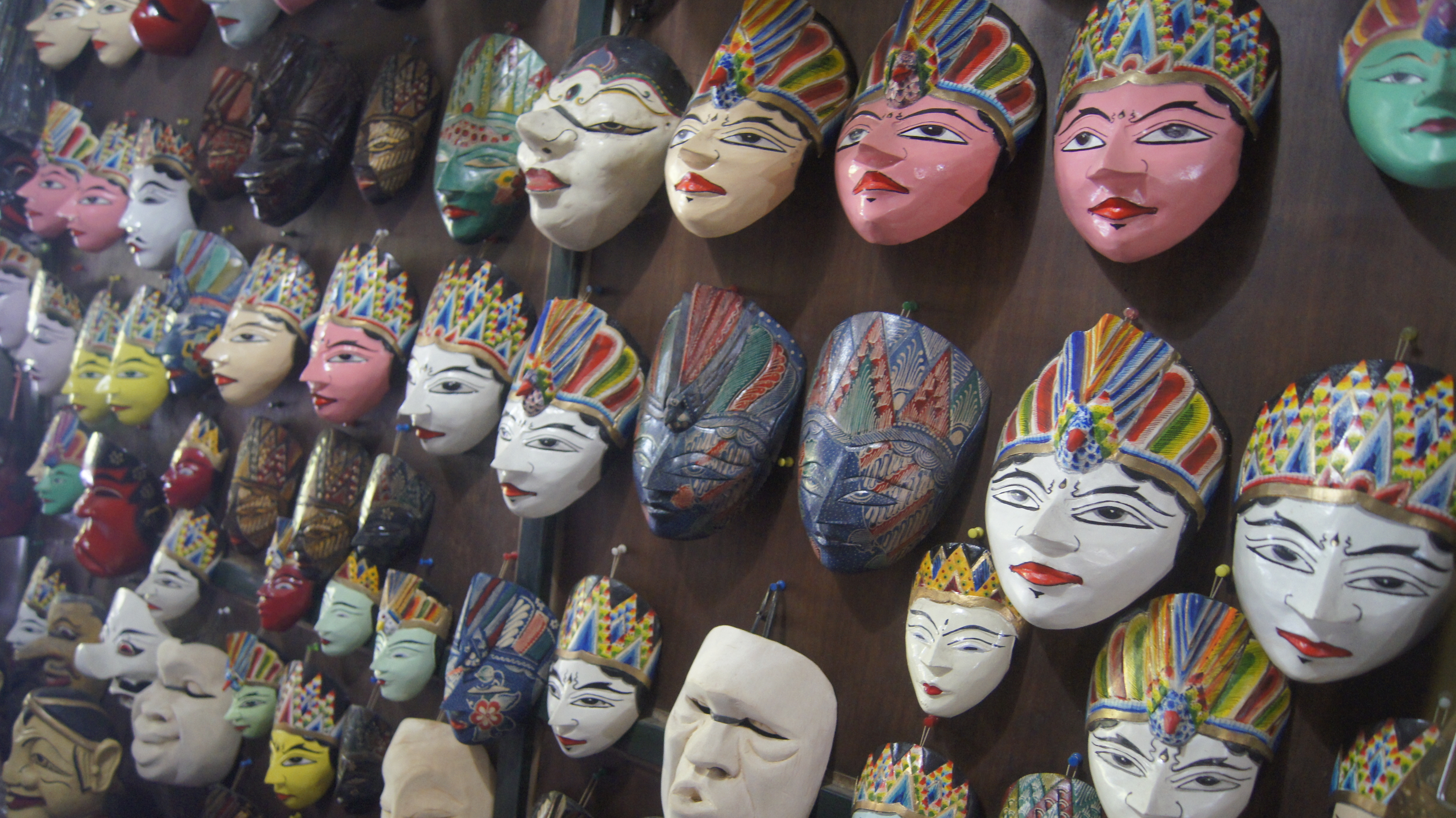 Walapun berbeda warna dan jenis, tetapi mereka sesama topeng